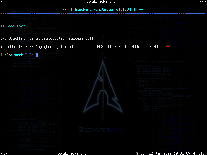 Das Terminal unter BlackArch Linux, nach Beendigung der Installation. Hier sind humorvolle Anspielungen auf die Gaming- und Hackerszene zu sehen (Persiflage).